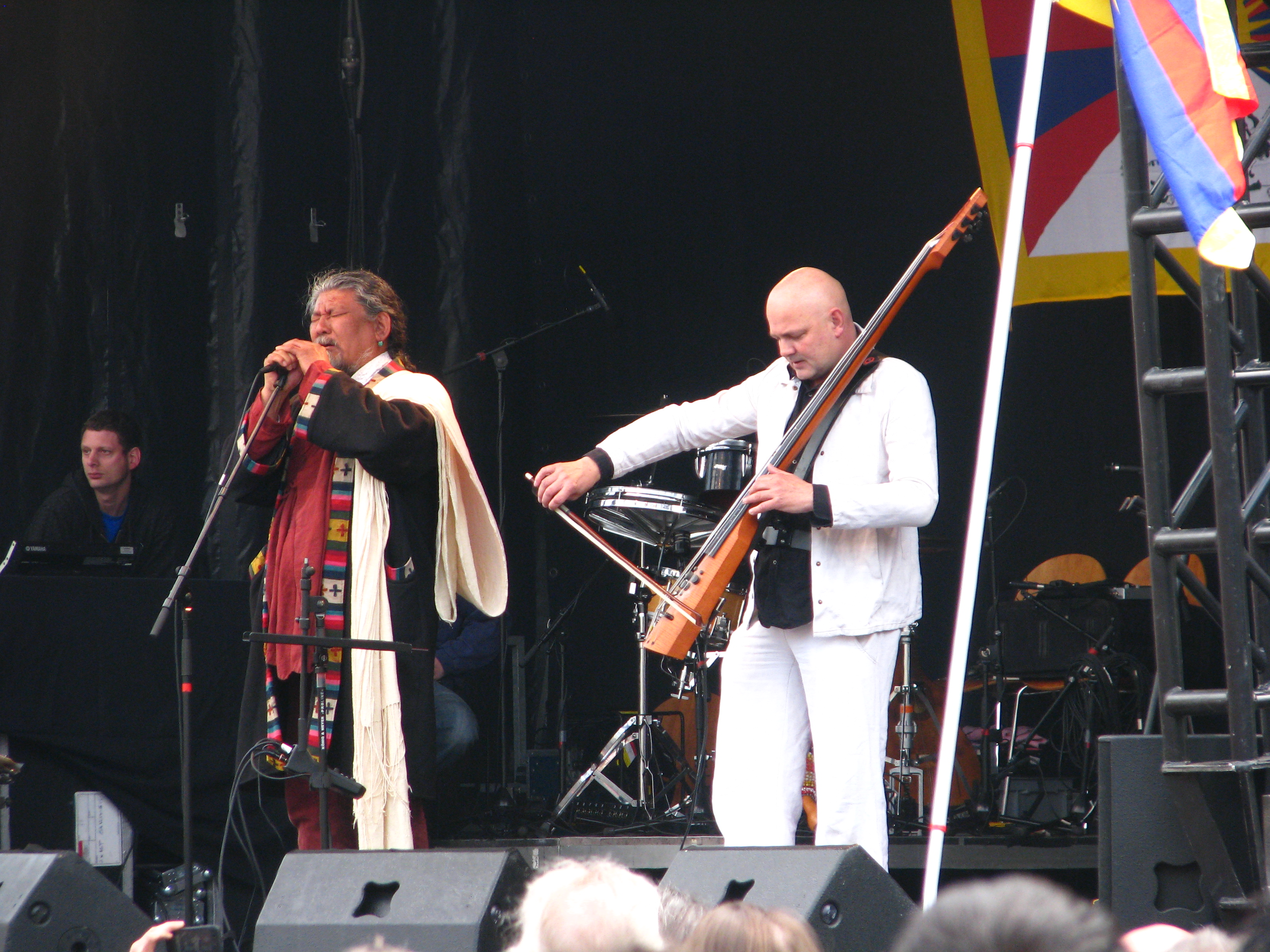 Die Schweiz für Tibet - Tibet für die Welt, Solidaritätskundgebung vom 10. April 2010, veranstaltet von der Gesellschaft Schweizerisch-Tibetische Freundschaft (GSTF) auf dem Münsterhof in Zürich. Showing Tibetan musician Loten Namling, left.